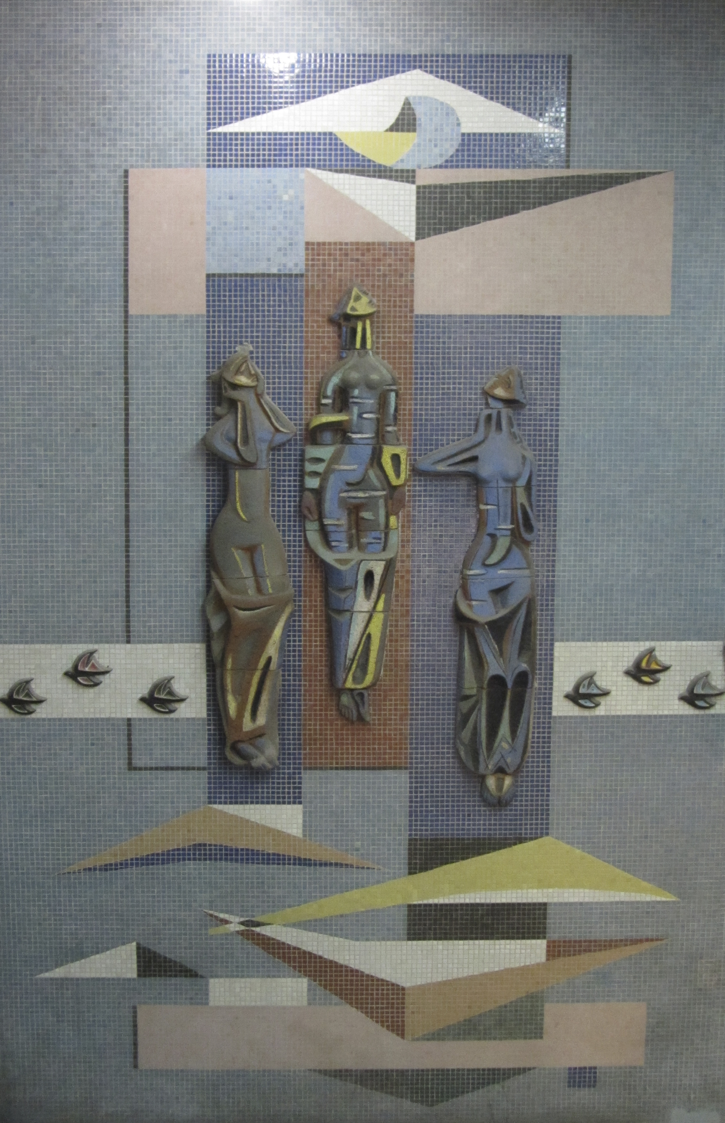 Obra "Las Tres Pascualas" (1959) del artista Eugenio Brito Galería Universitaria, Concepción, Chile Septiembre de 2012